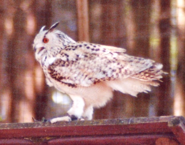 Sibirischer Uhu (Bubo bubo sibiricus) im Wildpark Poing